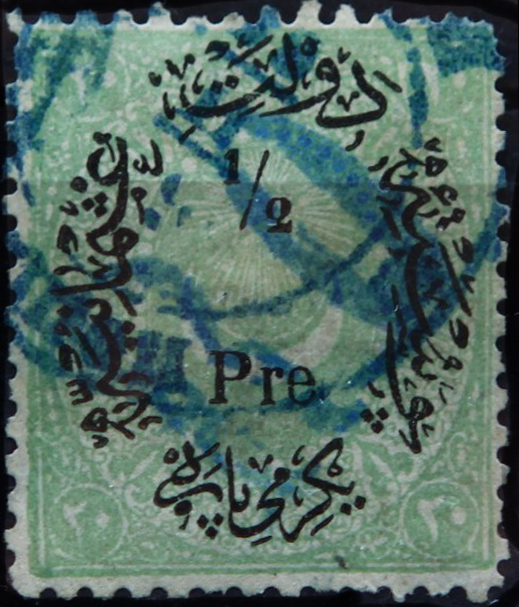 Первая почтовая марка Восточной Румелии